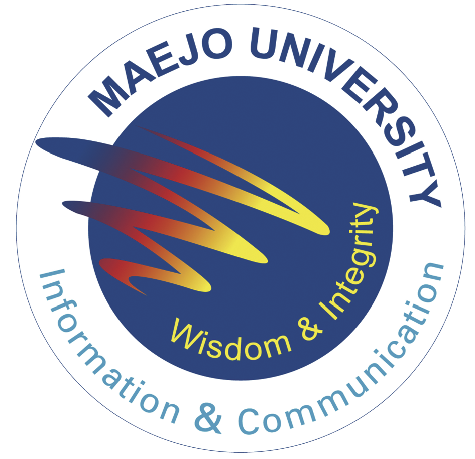 ตราสัญลักษณ์ คณะสารสนเทศและการสื่อสาร